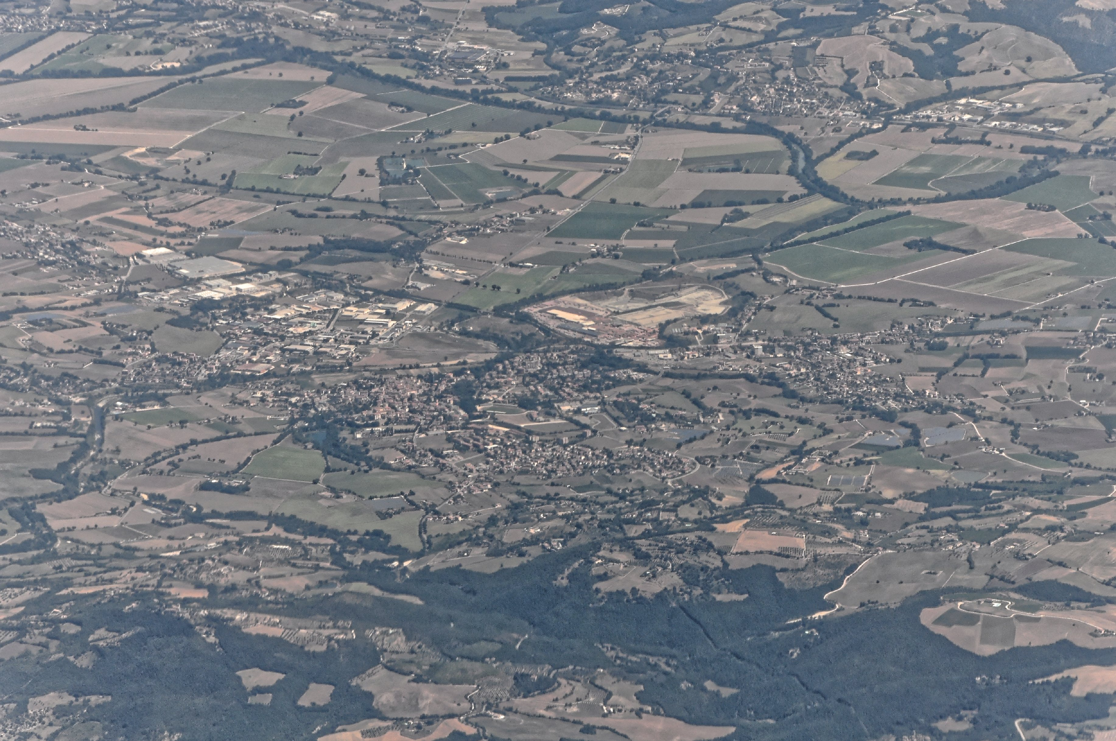 Bilder vom Flug -Rom-Düsseldorf-Hamburg 2013 Dieses Foto entstand in Zusammenarbeit mit Stadtbesichtigungen.de Die Seiten Stadtbesichtigungen.de, der dazugehörige Reise Blog sowie die Facebookseite: Stadtbesichtigungen Rom dürfen dieses Bild für Ihre Veröffentlichungen ohne den Hinweis auf Wikipedia, Commons bzw der Lizenz verwenden. Die Verantwortlichen habe von mir (Ra Boe) die Originaldaten zur freien Verfügung übermittelt bekommen.